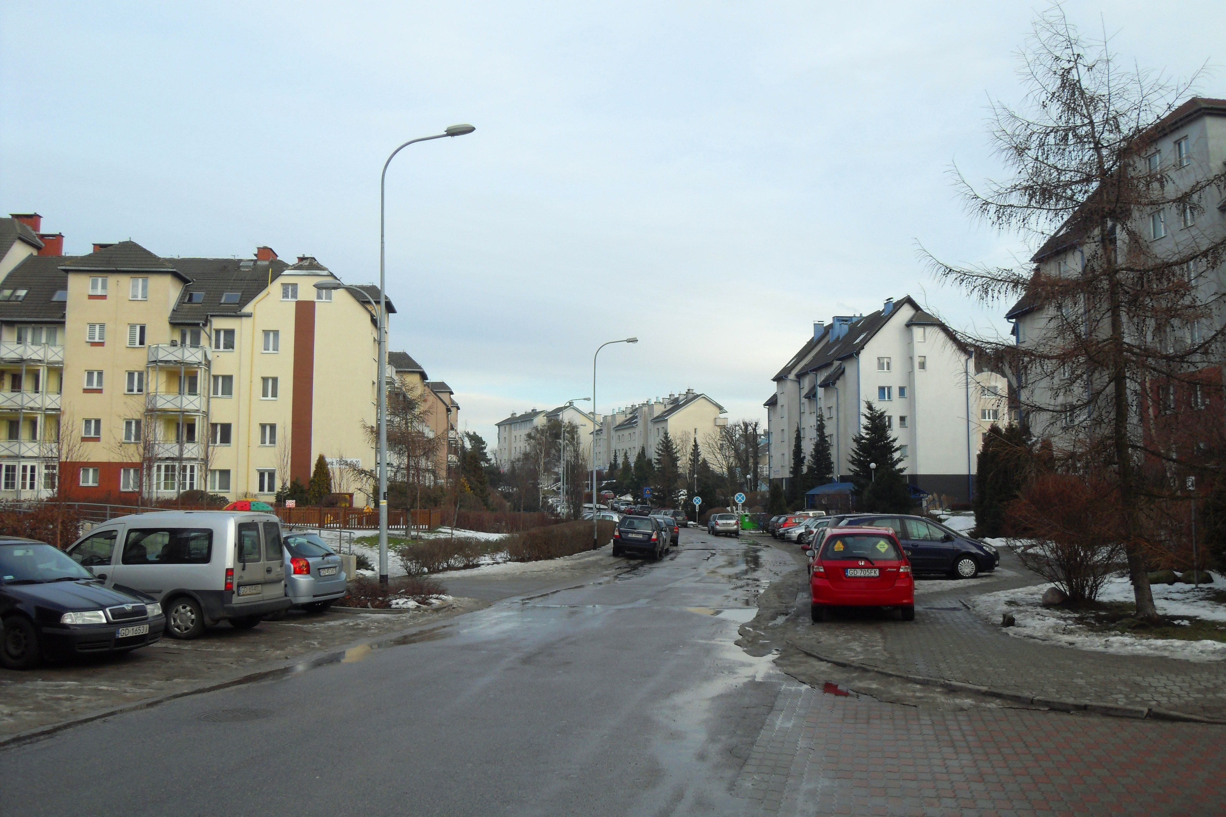 Gdańsk Aniołki, ul, Focha.